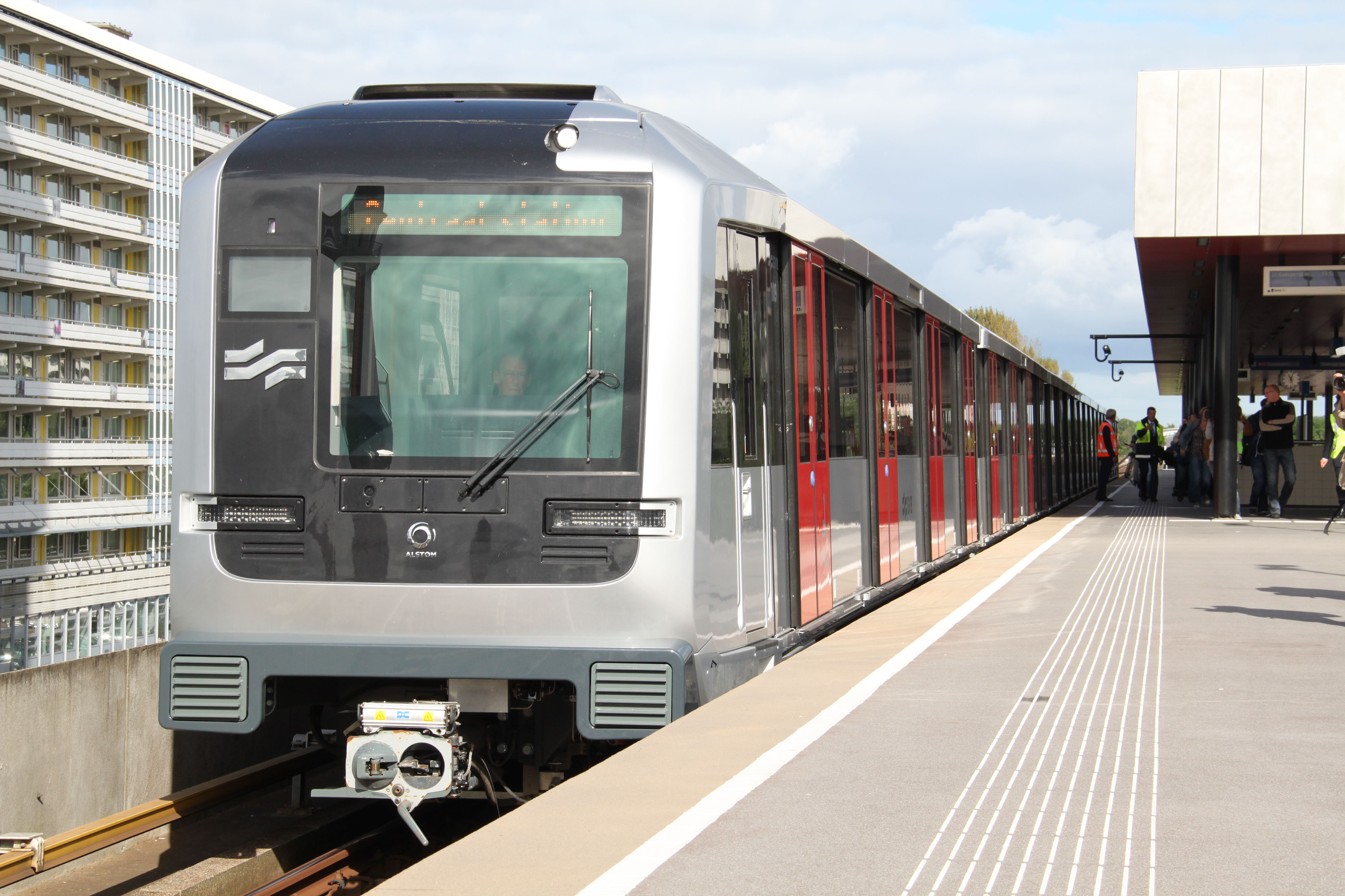 Het teststel type M5 van de metro van Amsterdam tijdens de perspresentatie in september 2012.